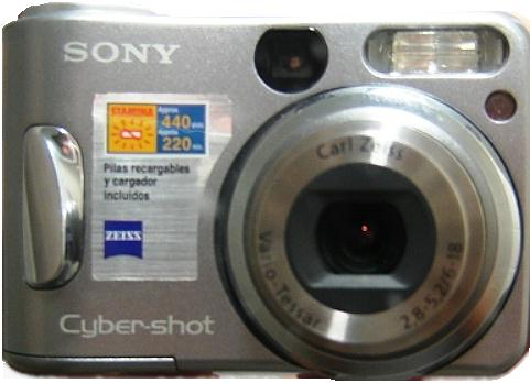 Camara digital Sony Cyber-shot DSC-S580.